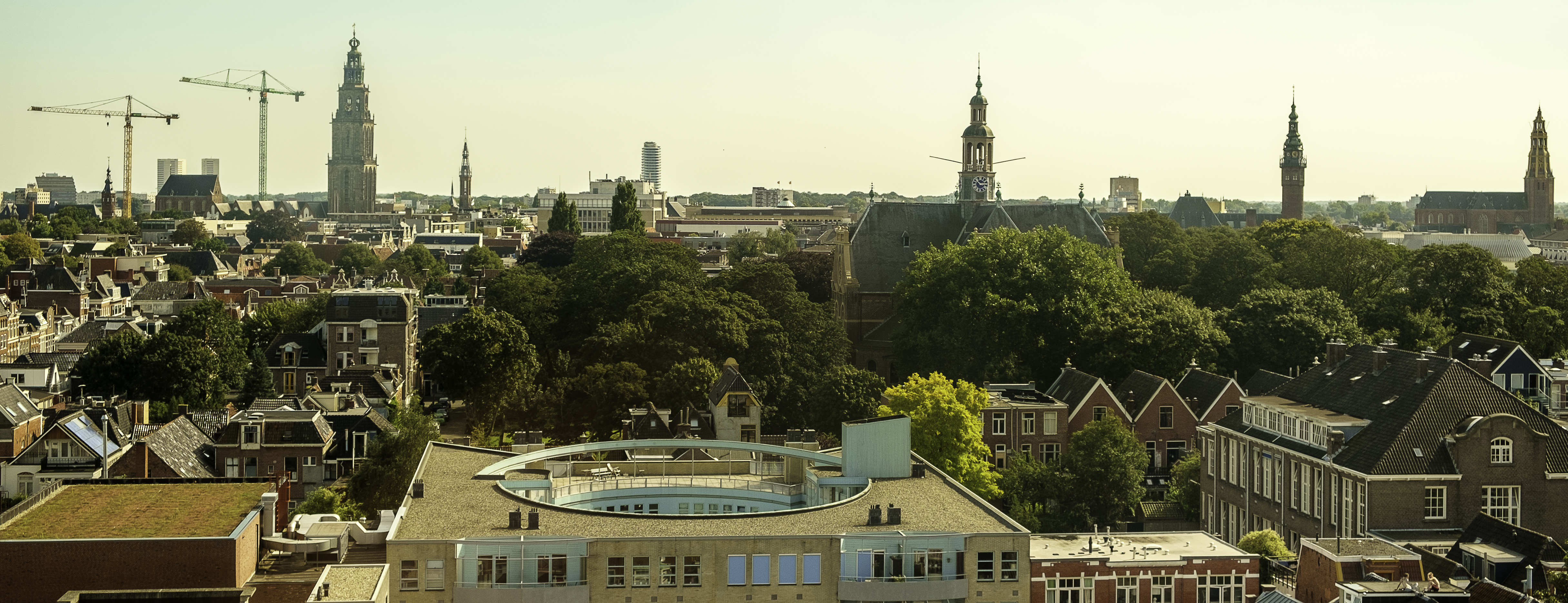 Panorama van het centrum van Groningen vanaf de watertoren aan de Noorderbinnensingel